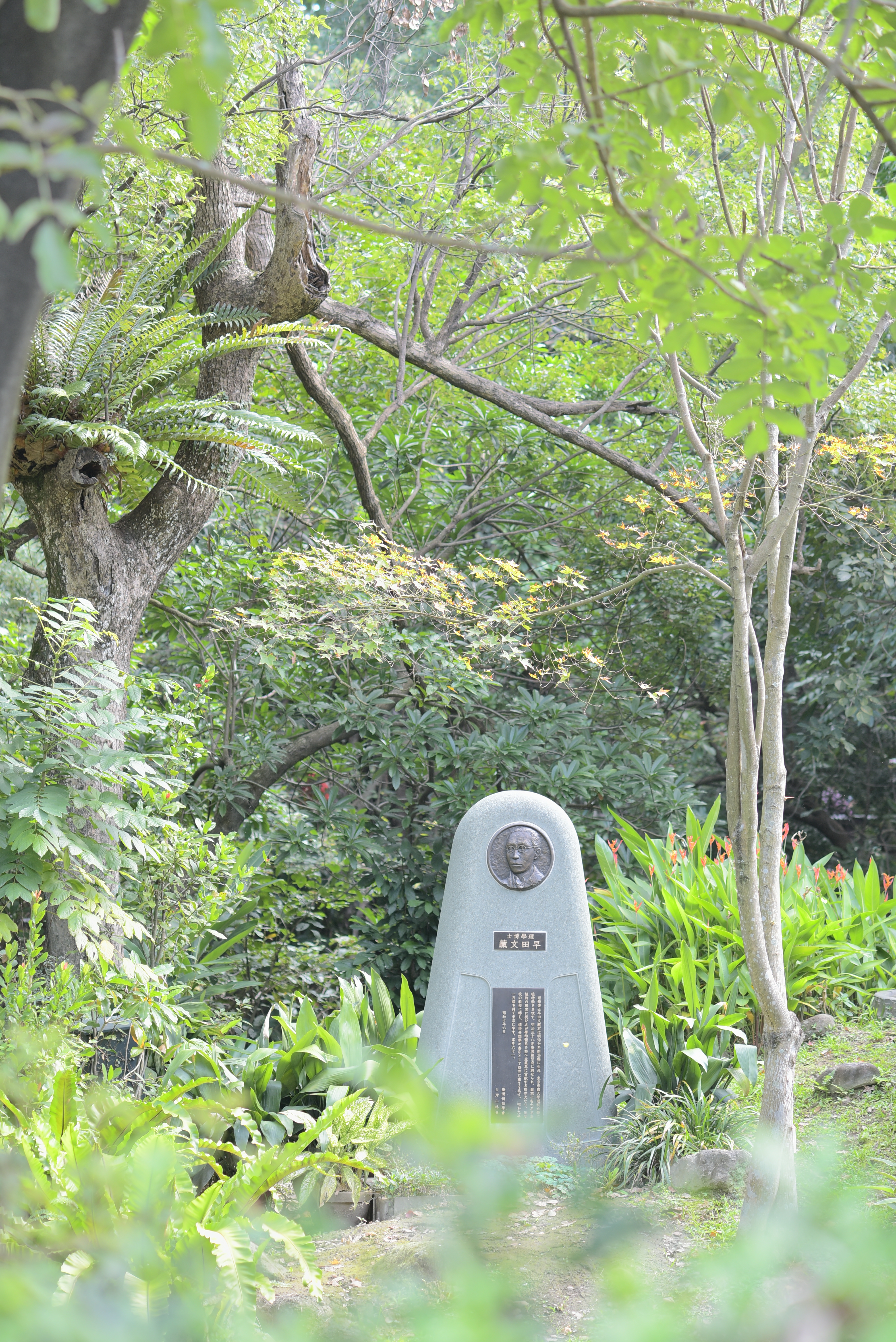 2018臺北植物園早田文藏紀念碑